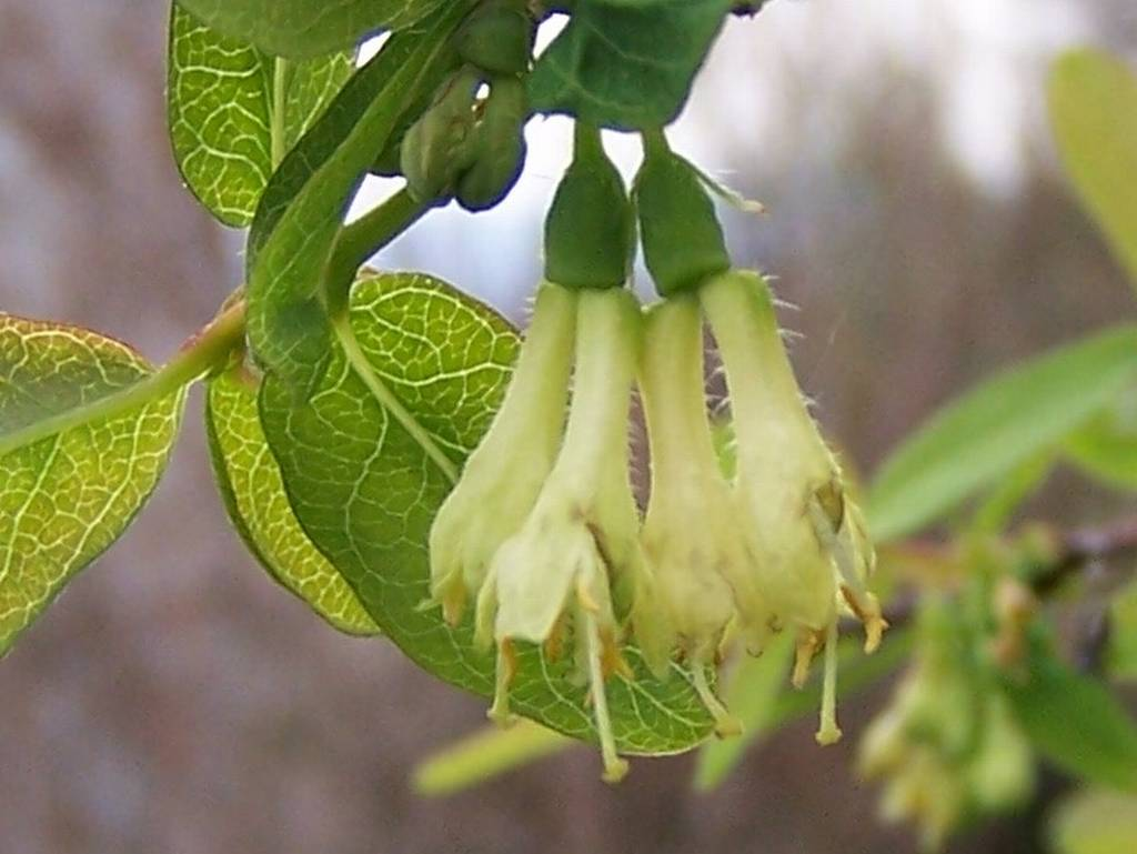 Lonicera coerulea (pl. wiciokrzew siny, jagoda kamczacka)